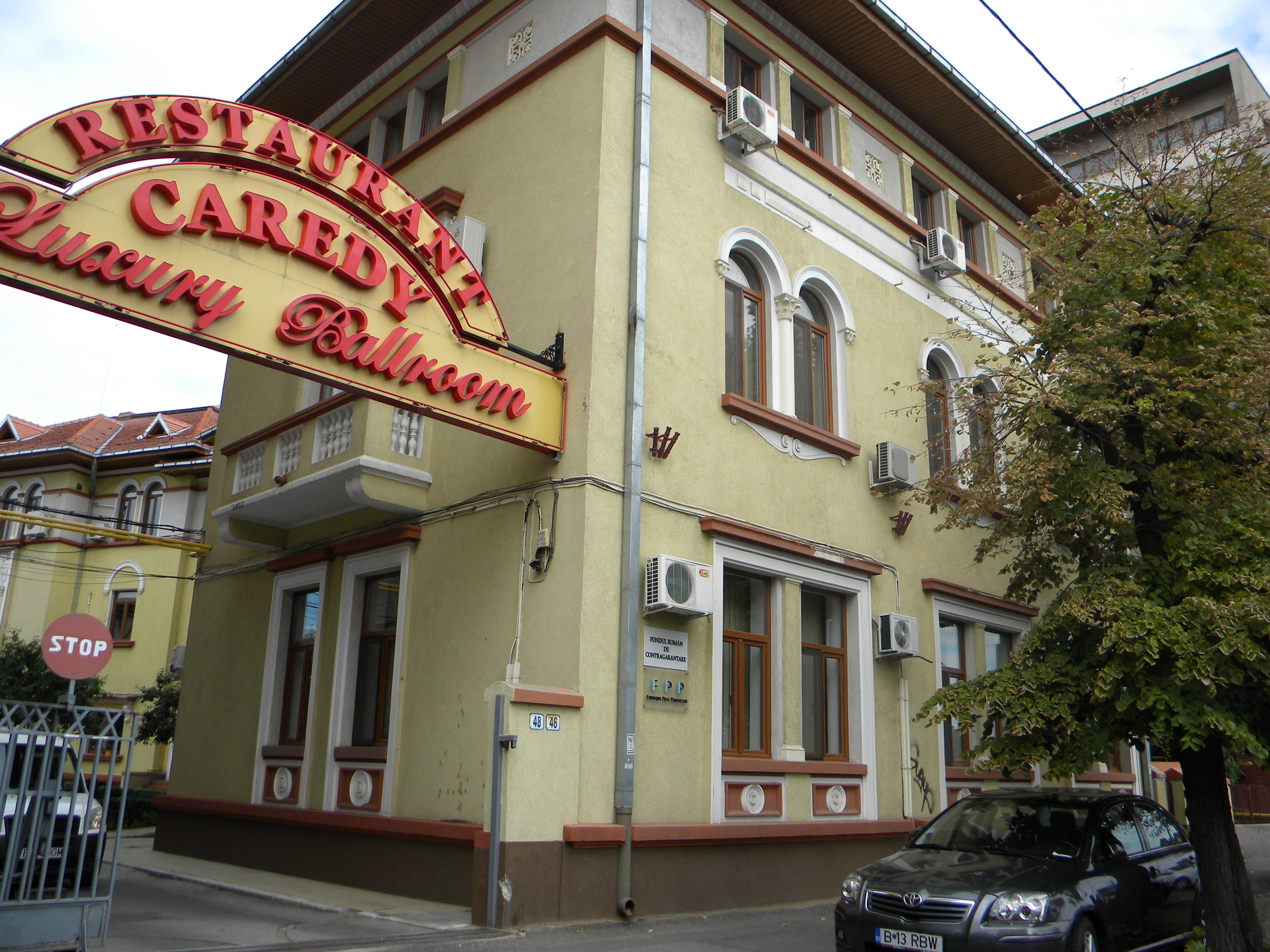 Bucuresti, Romania, Calea Plevnei nr. 46 sect. 1 (vedere de ansamblu)